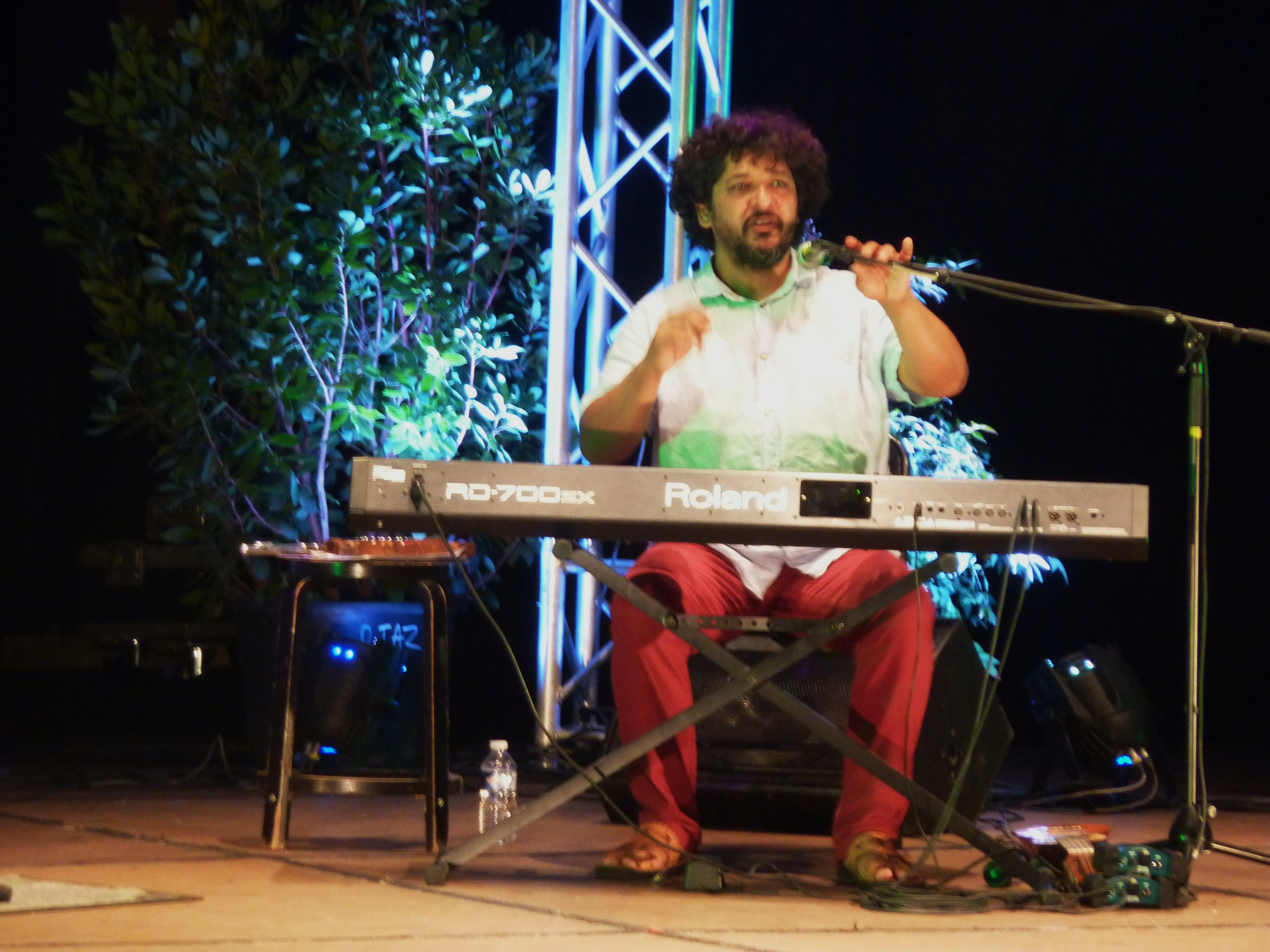 Carlos Maza, Festival Convergences, La Ciotat,08.2017